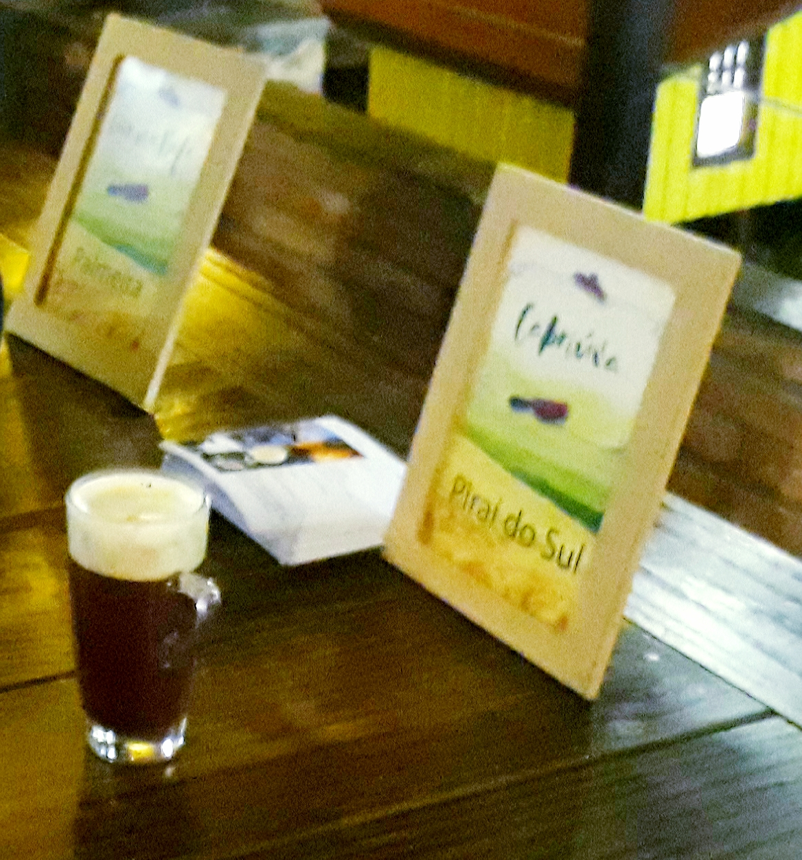 Cabriúva, bebida de vinho típica do município de Piraí do Sul, no Paraná, Brasil.